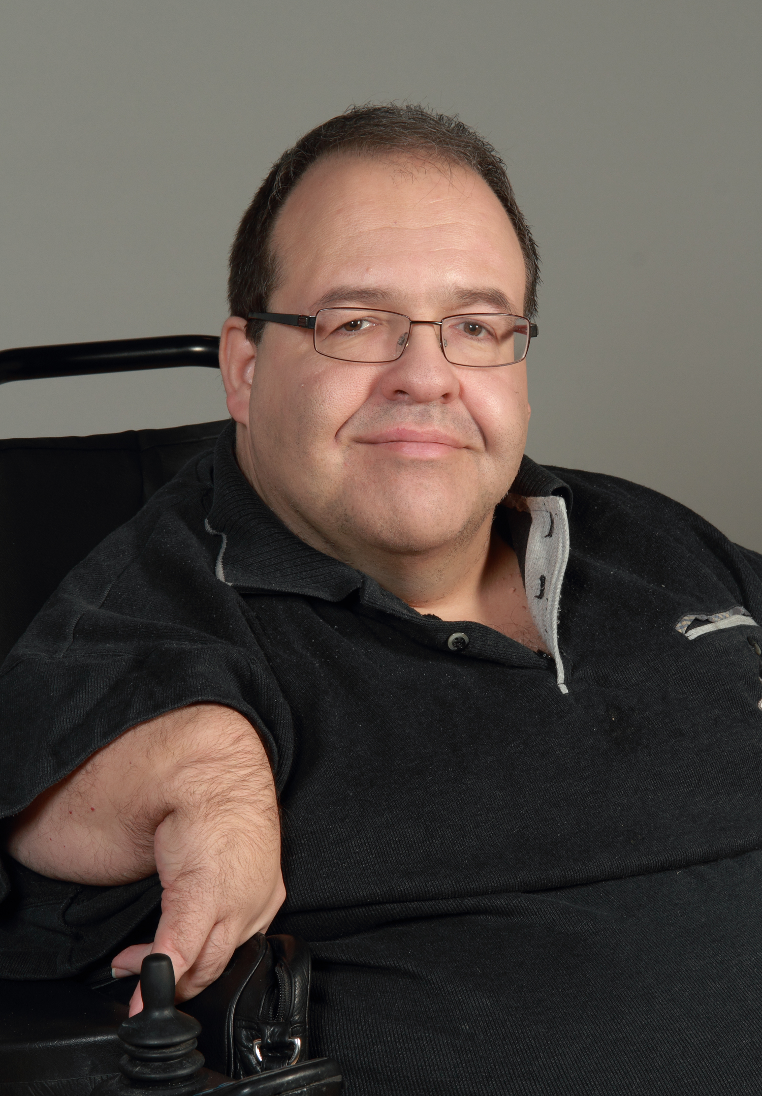 LandtagsabgeordneteR NRW